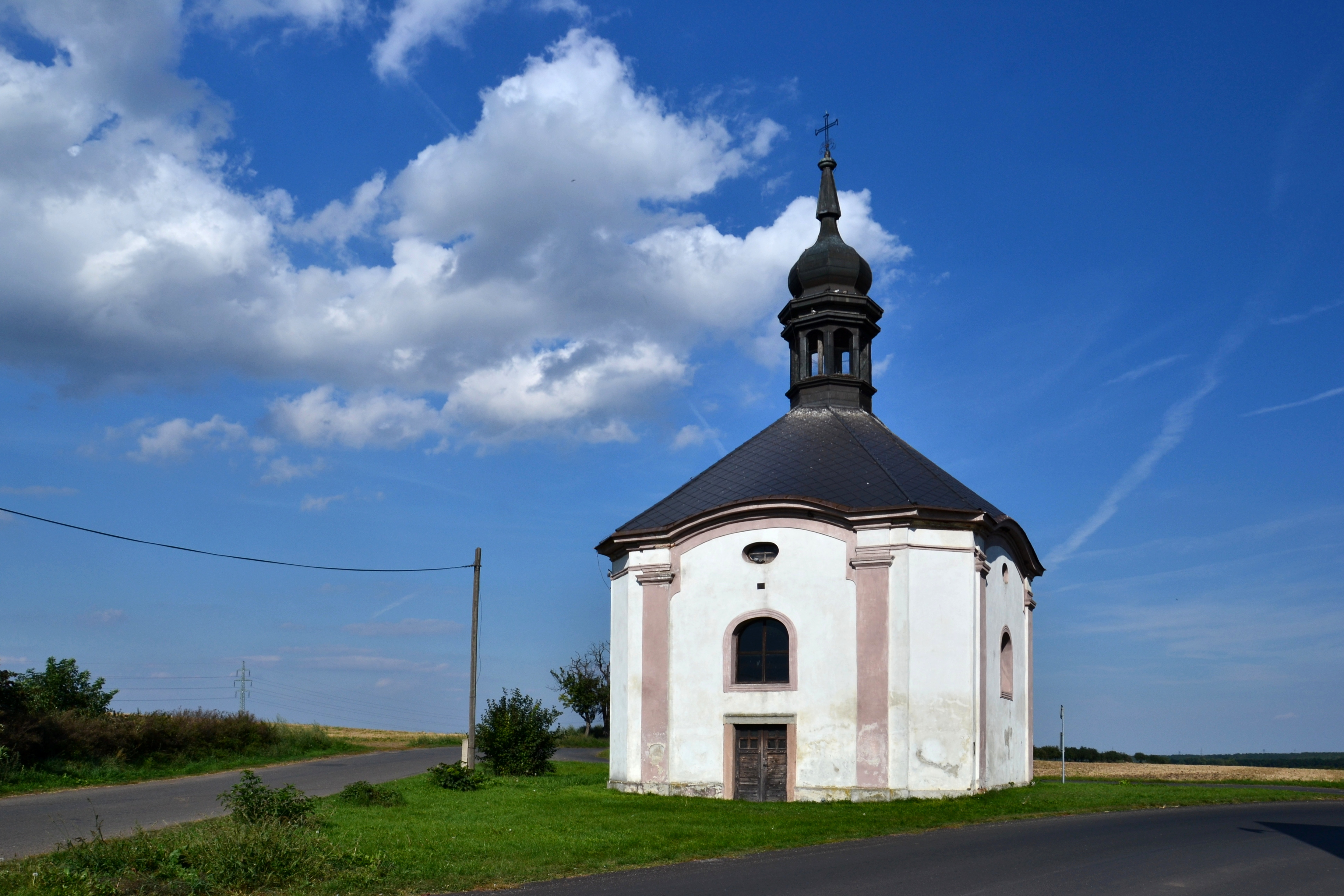 Kaple sv. Anny (Vysoké Třebušice), na V okraji obce, křížení silnic č. 224 a místní komunikace, Vysoké Třebušice, Vysoké Třebušice.